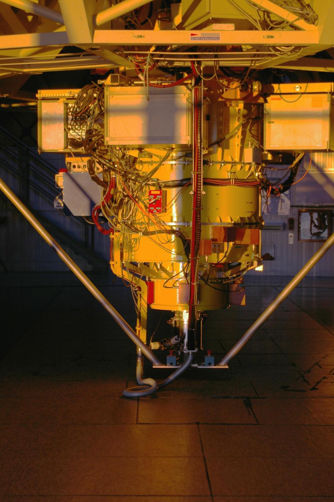 Paranal Observatorium, UT2 mit Instrument FORS1